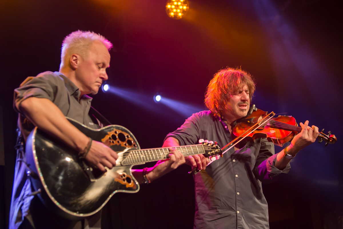 Farfarello solo zu 2’t in der Harmonie, Bonn